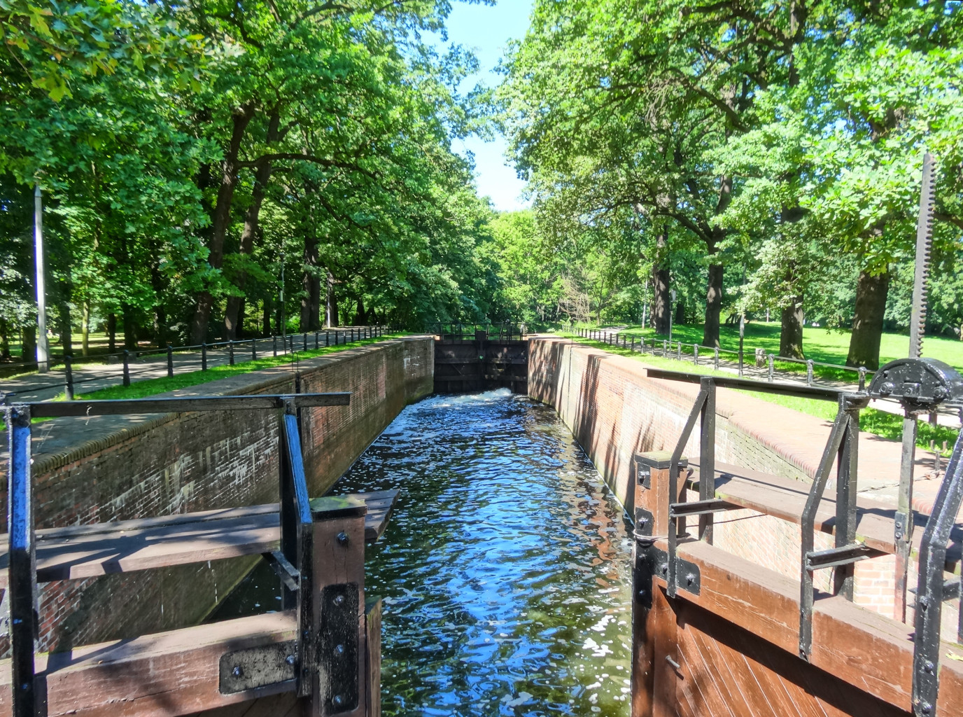 Śluza V przy ul. Czarna Droga w Bydgoszczy na Starym Kanale Bydgoskim